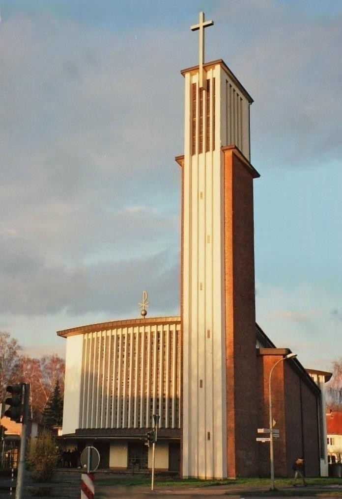 Röm-kath. St. Godehardkirche in Göttingen, Weststadt